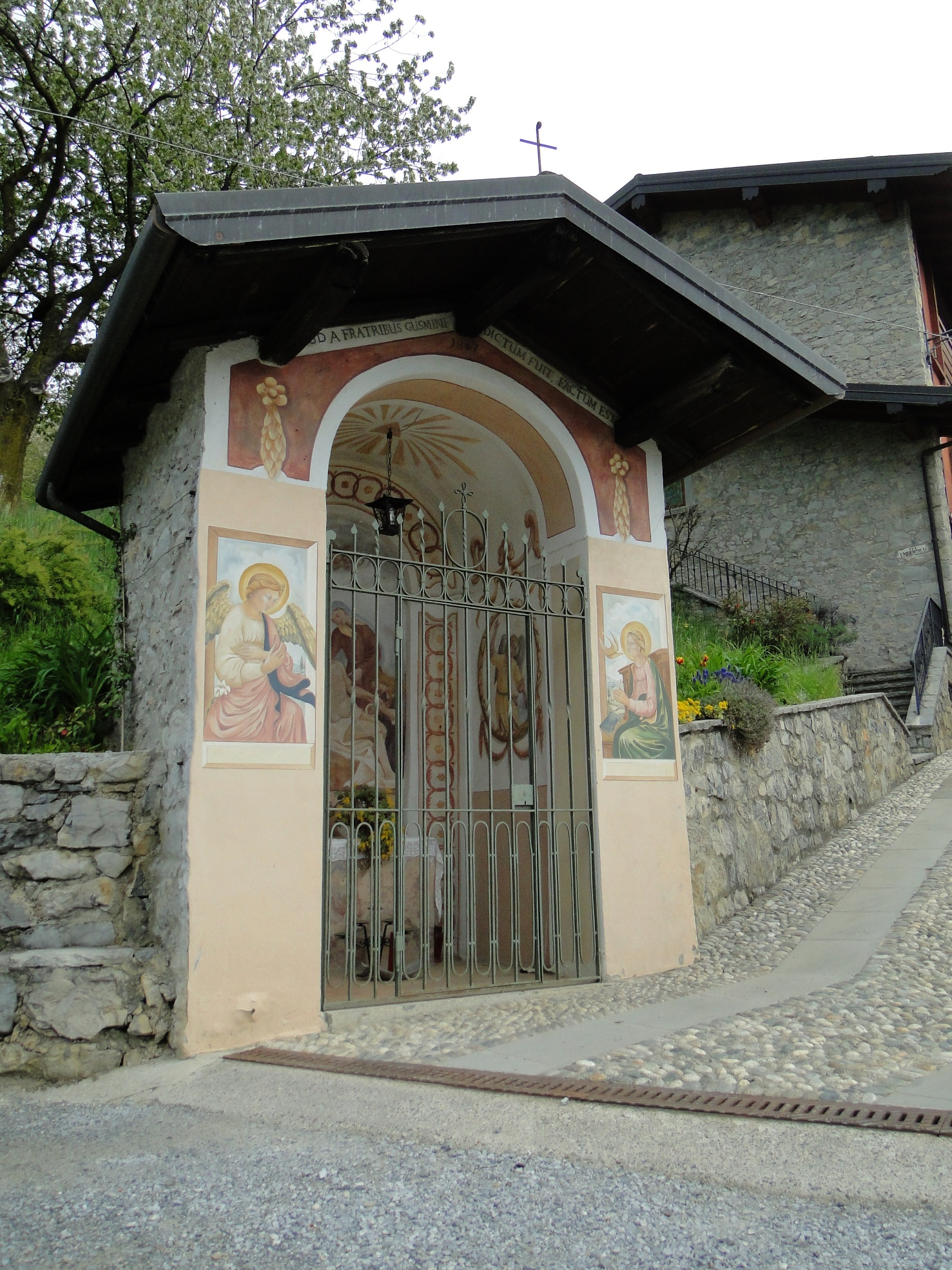 Tribulina votiva presso Orezzo, frazione di Gazzaniga (BG), Italia